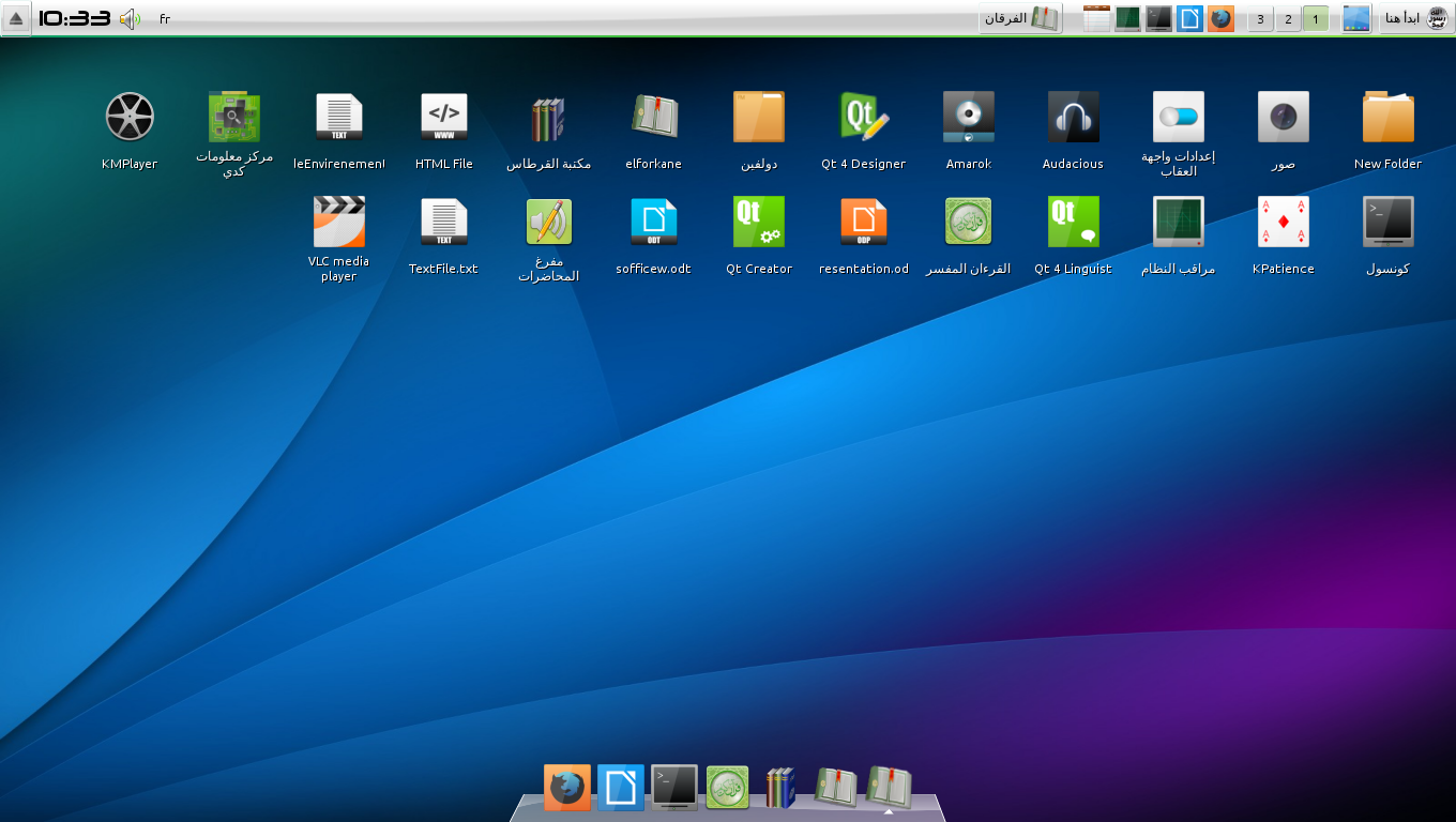 سطح المكتب العقاب تطوير جديد لبيئة سطح المكتب